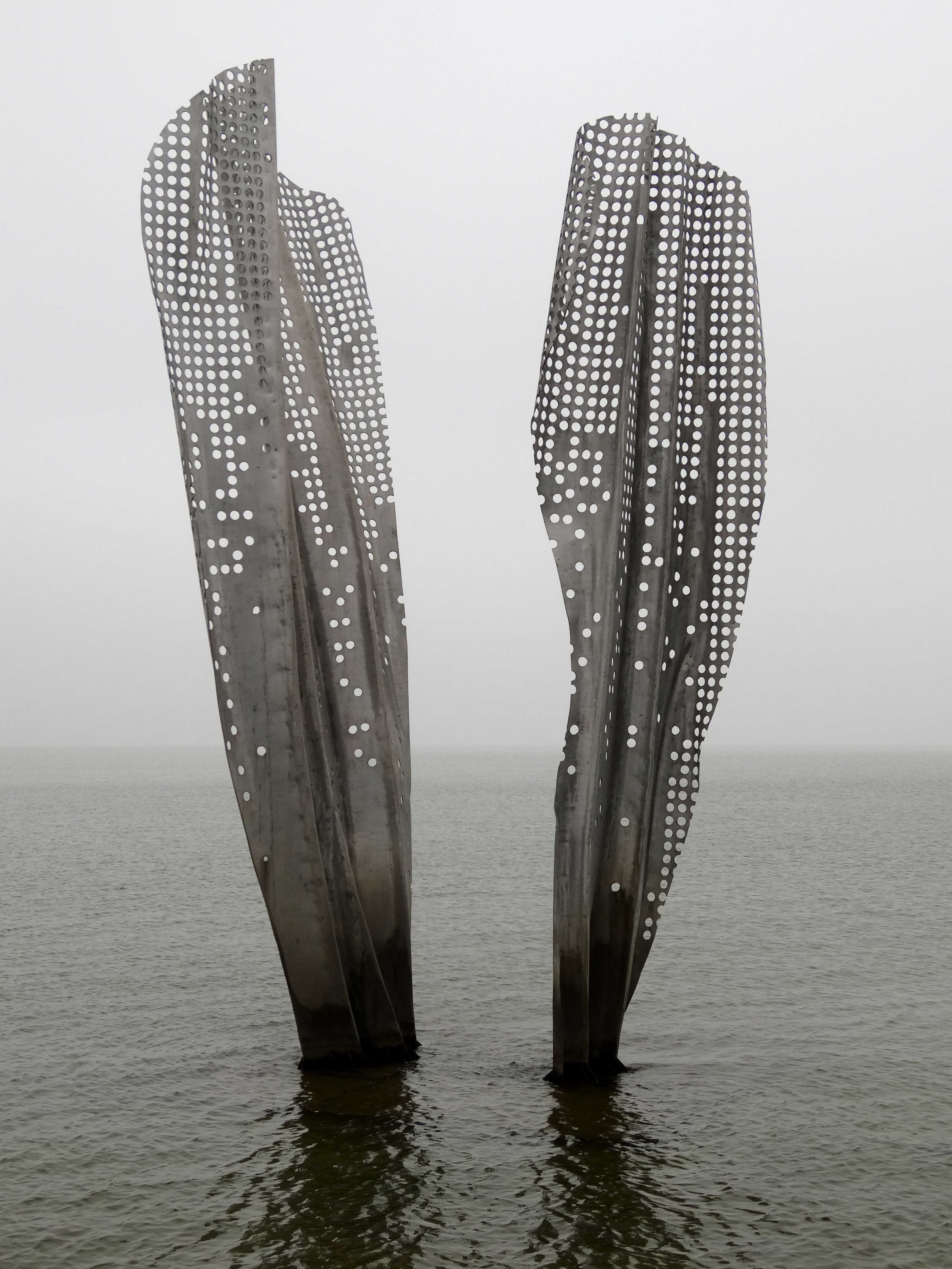 Waaier door Rudi van de Wint Hoorn